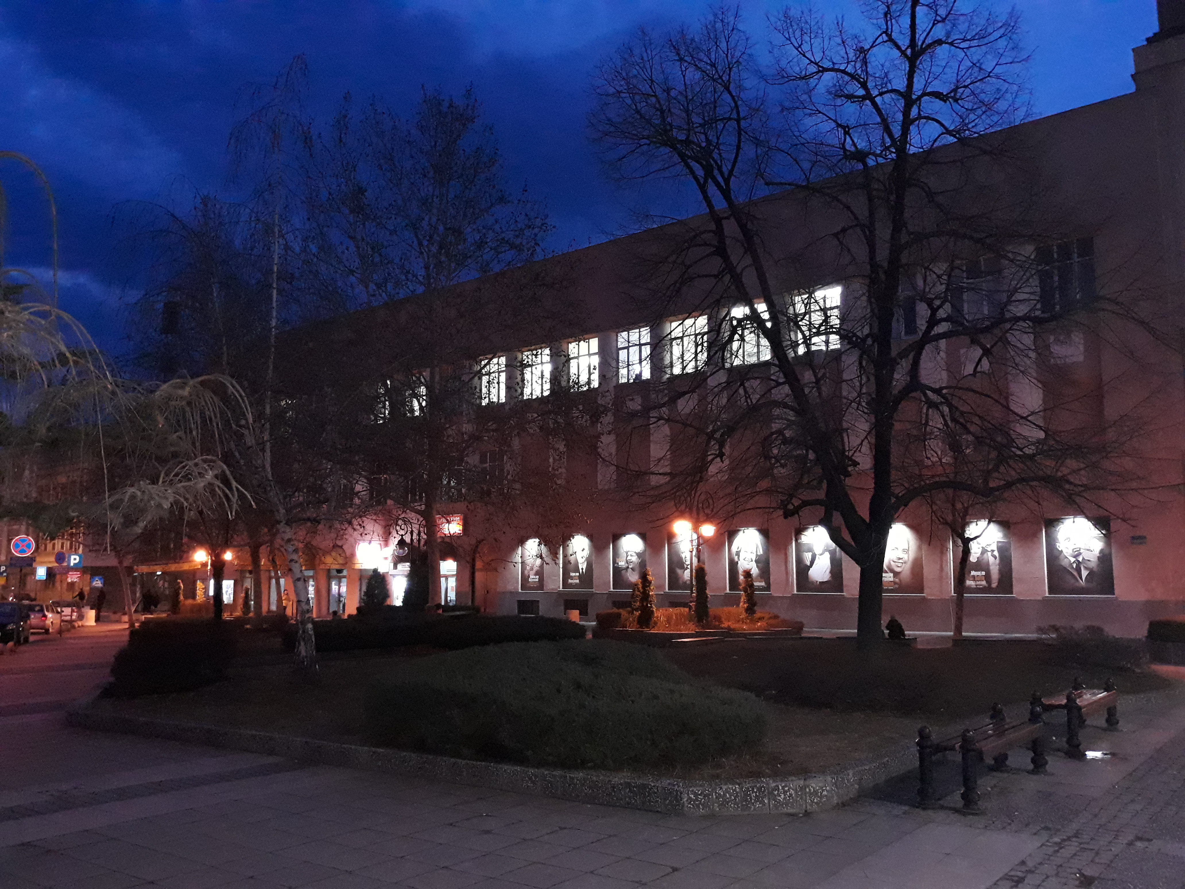 Културни центар Крушевац